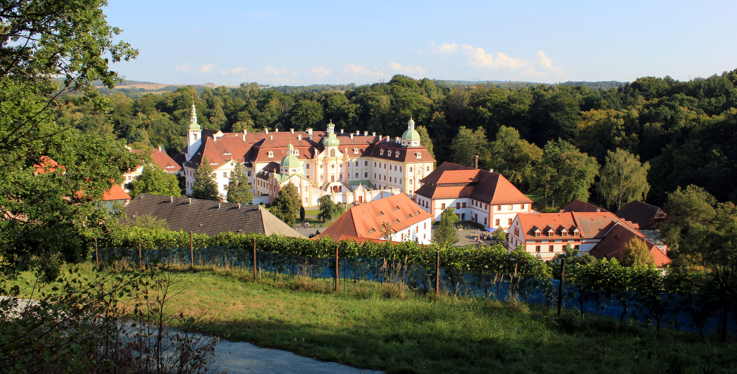 Kloster St. Marienthal bei Ostritz in der Oberlausitz (Sachsen).Hornjoserbsce: Klóšter Marijiny doł blisko Wostrowca w Hornjej Łužicy.